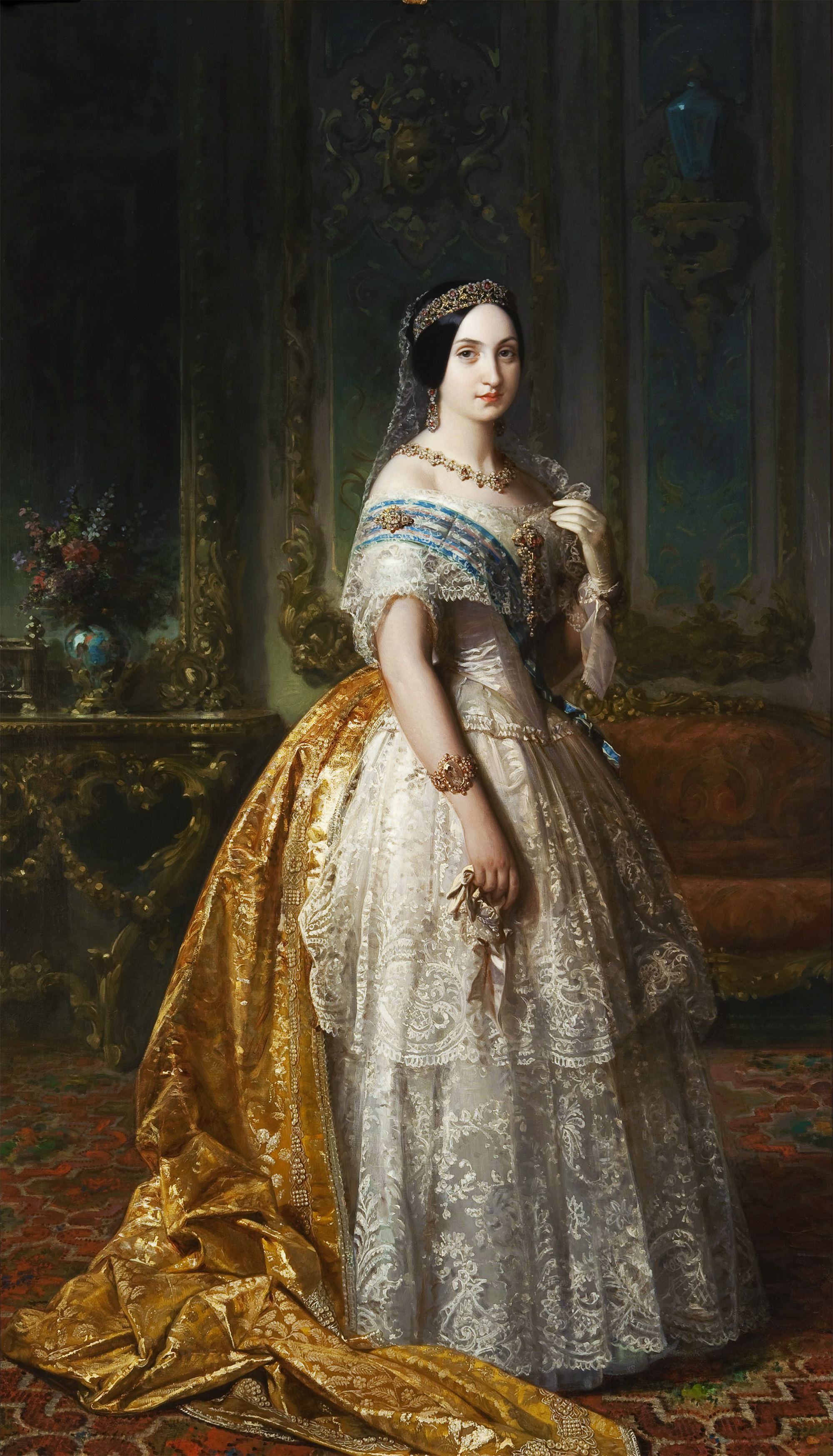 Retrato de la infanta Luisa Fernanda de Borbón (1832-1897), que fue hija del rey Fernando VII de España y hermana de la reina Isabel II.